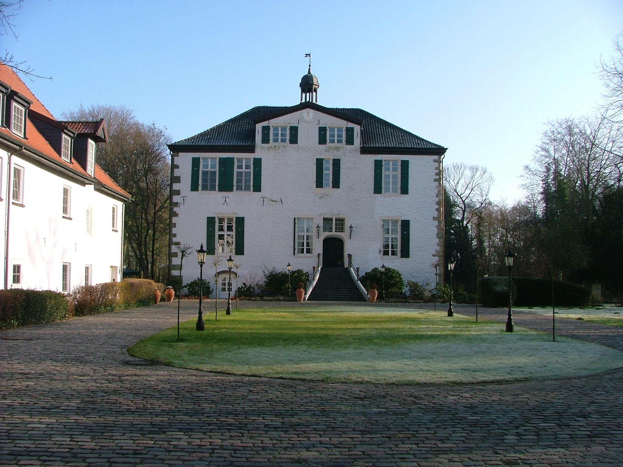 Haus Pröbsting - Haupthaus